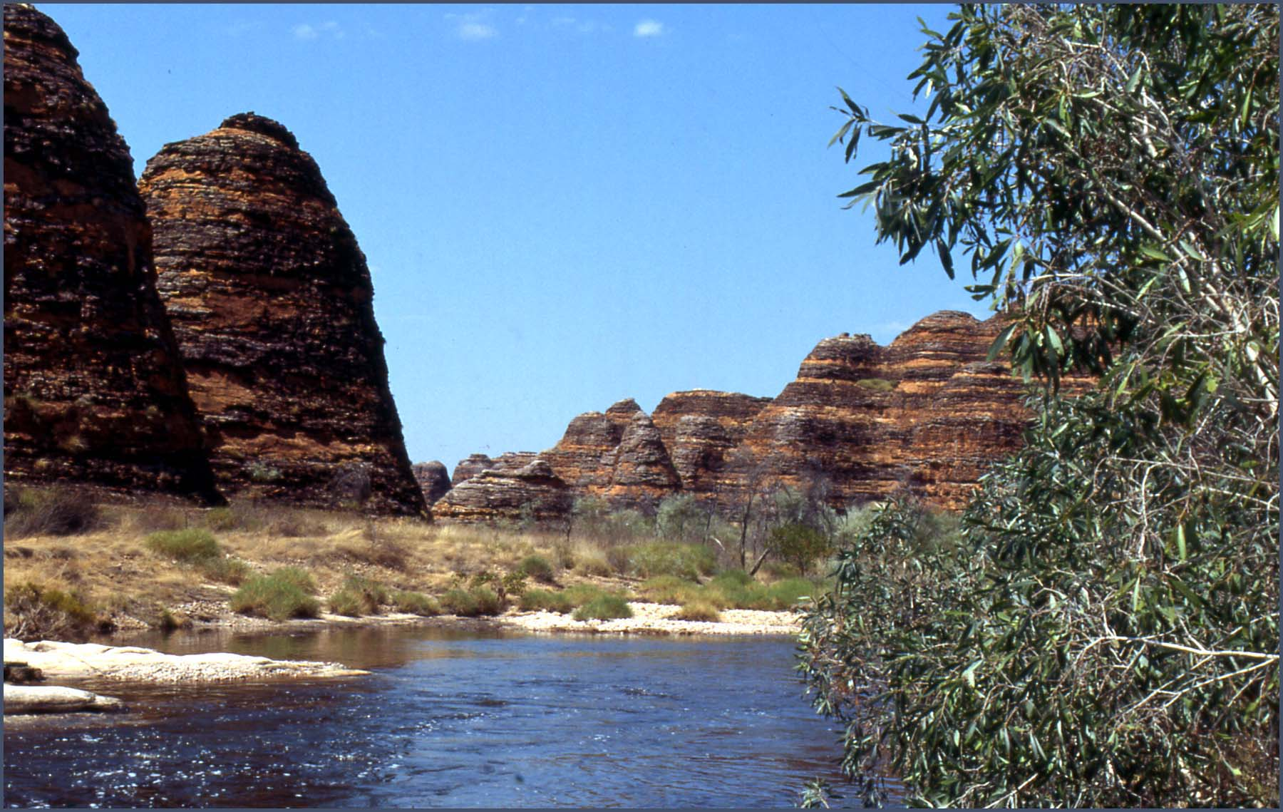 Purnululu